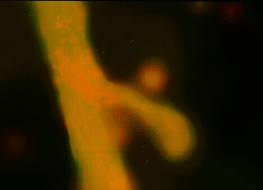 Pilzhyphe im Urin. Wie man sieht können die Hyphen eine Breite von mehreren Mikrometern tragen. Ähnliche Form findet man bei B.Haefeli (Abb.1467) Fluoreszenz Akridinorange-Färbung